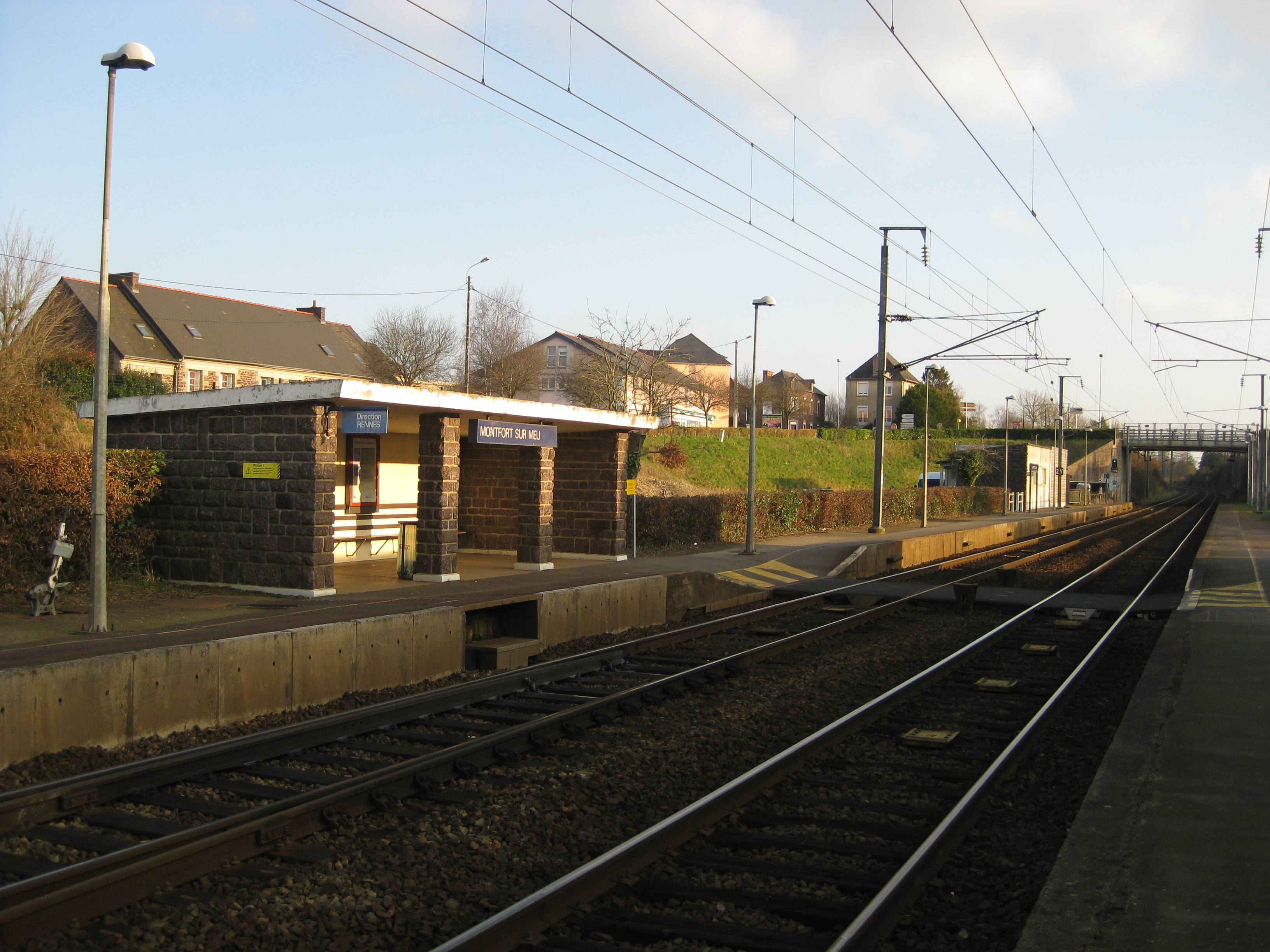 Voies de la gare SNCF de Montfort sur Meu